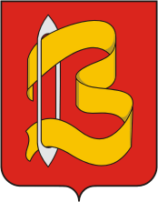 Герб города Вичуга